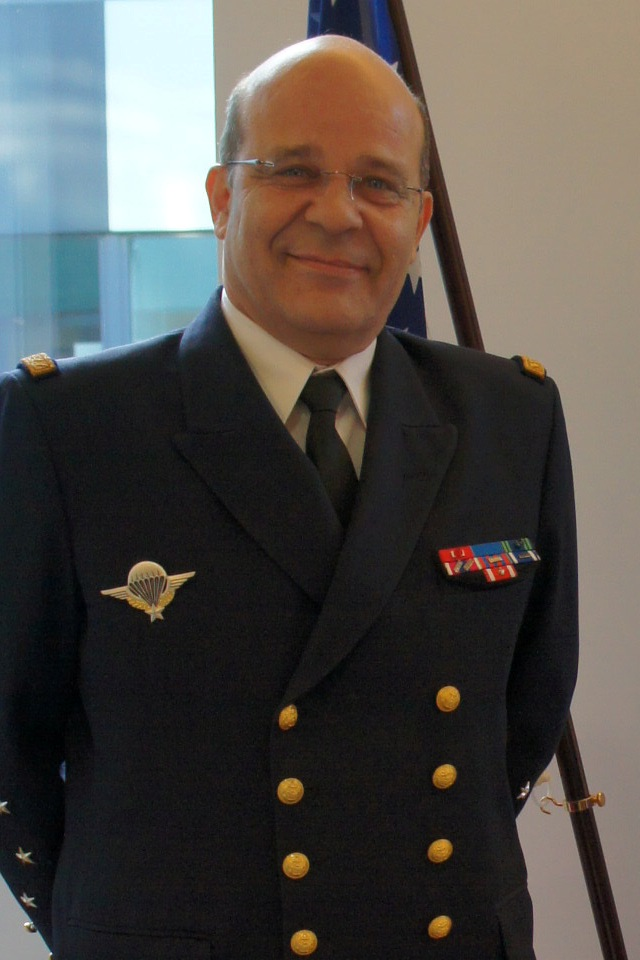 Amiral Christophe Prazuck